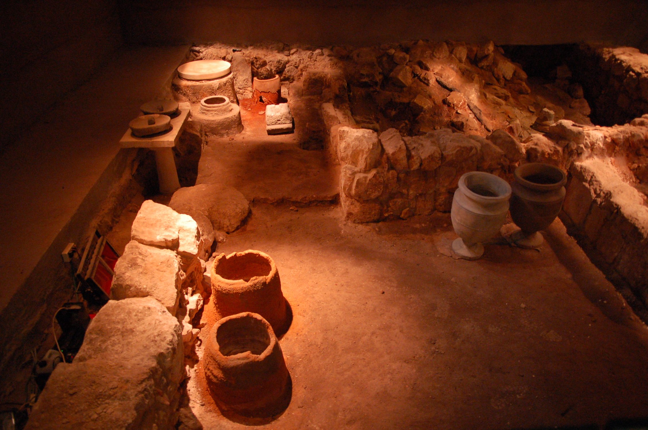 הבית השרוף הוא בית מגורים משלהי תקופת בית שני שקרס בשרפה הגדולה שהחריבה את ירושלים במרד הגדול (שנת 70 לספירה), ונתגלה מחדש בשנת 1970.